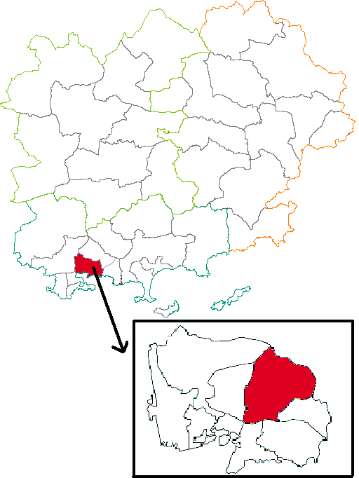 Situation du canton dans le département du Var (83), France